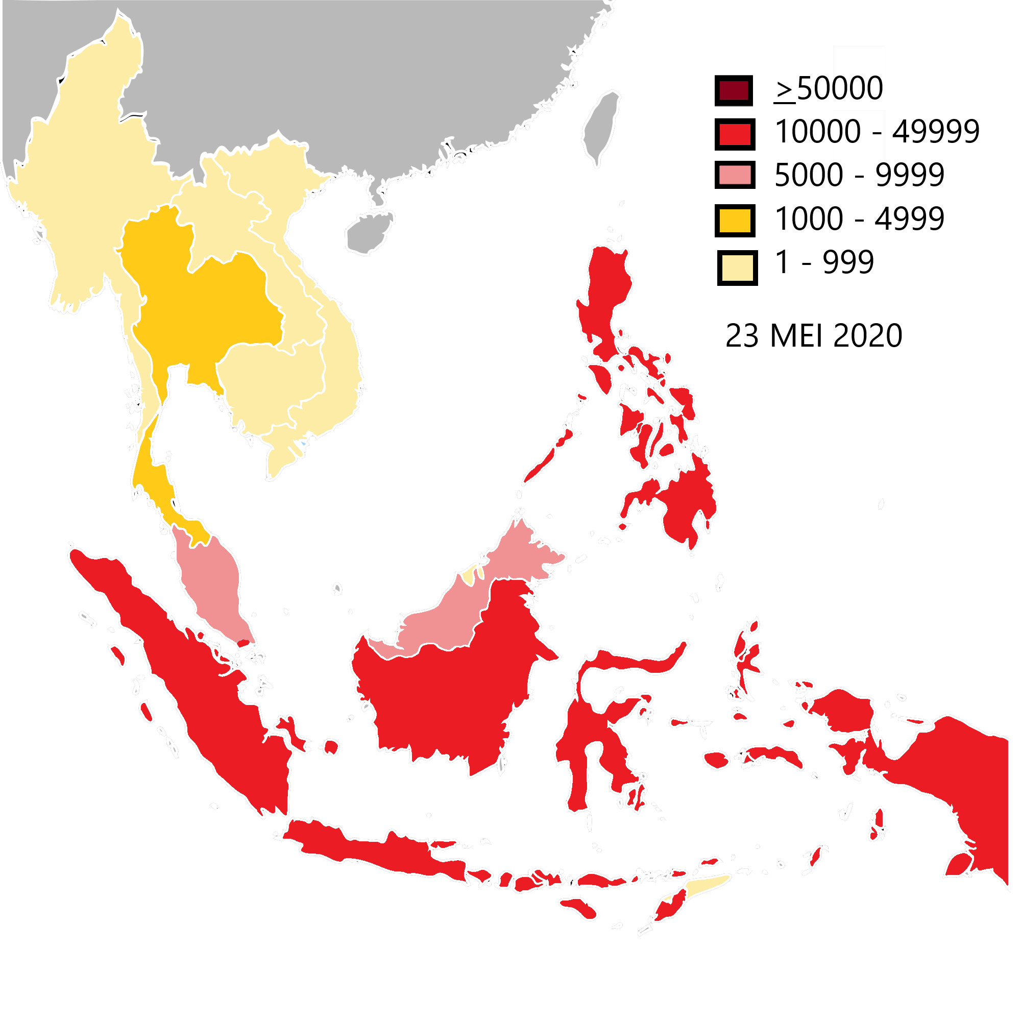 Peta jumlah kes COVID-19 di Asia Tenggara mengikut negara